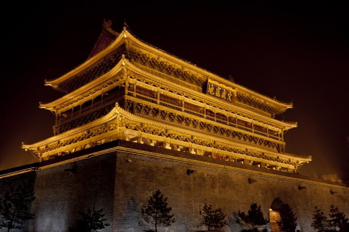 夜间的鼓楼